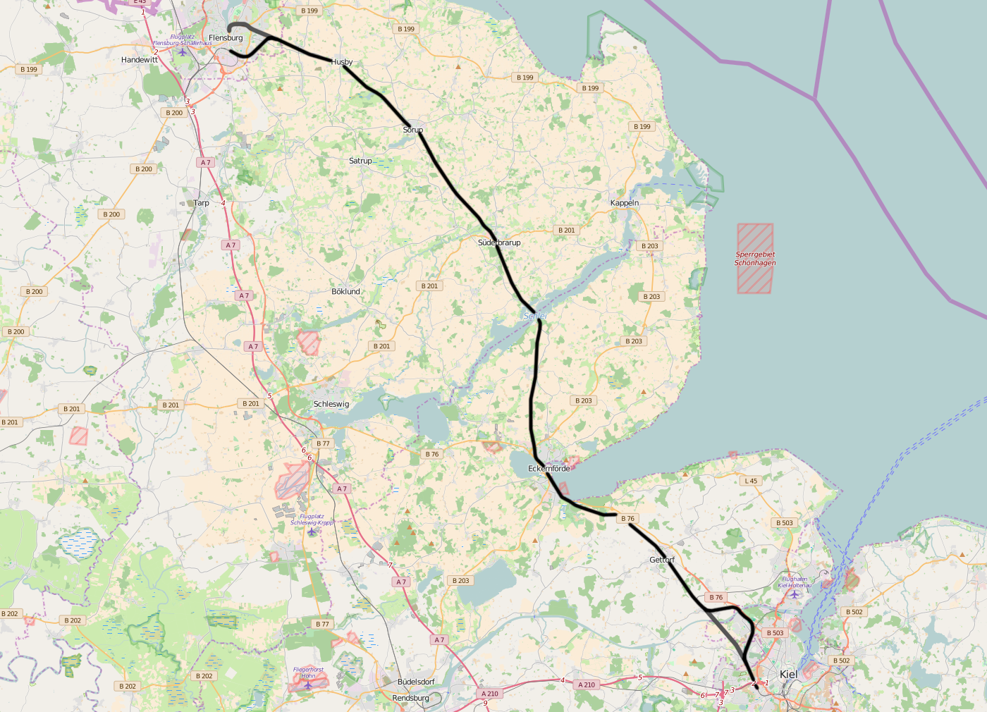 DB 1020, Kiel - Flensburg